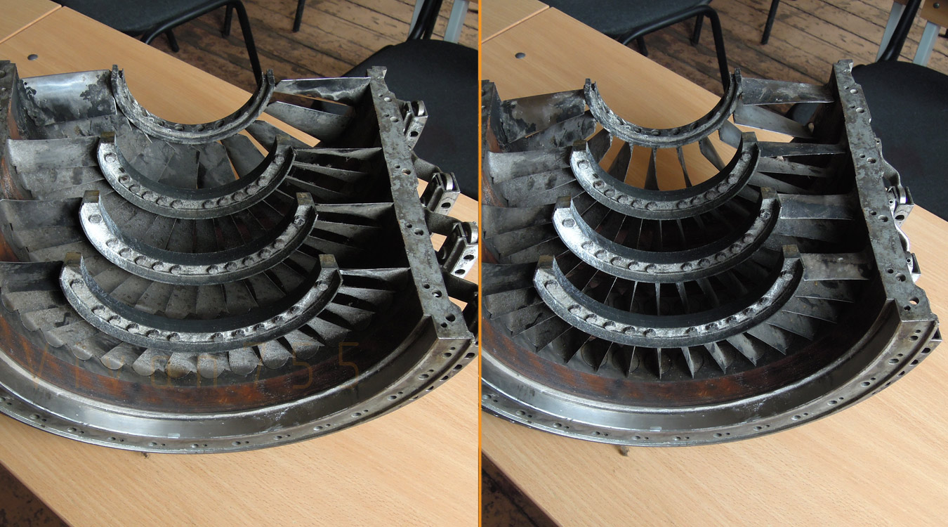 Открытые и закрытые регулируемые направляющие аппараты I — IV ступеней компрессора вертолётного двигателя ТВ2-117 (Ми-8)